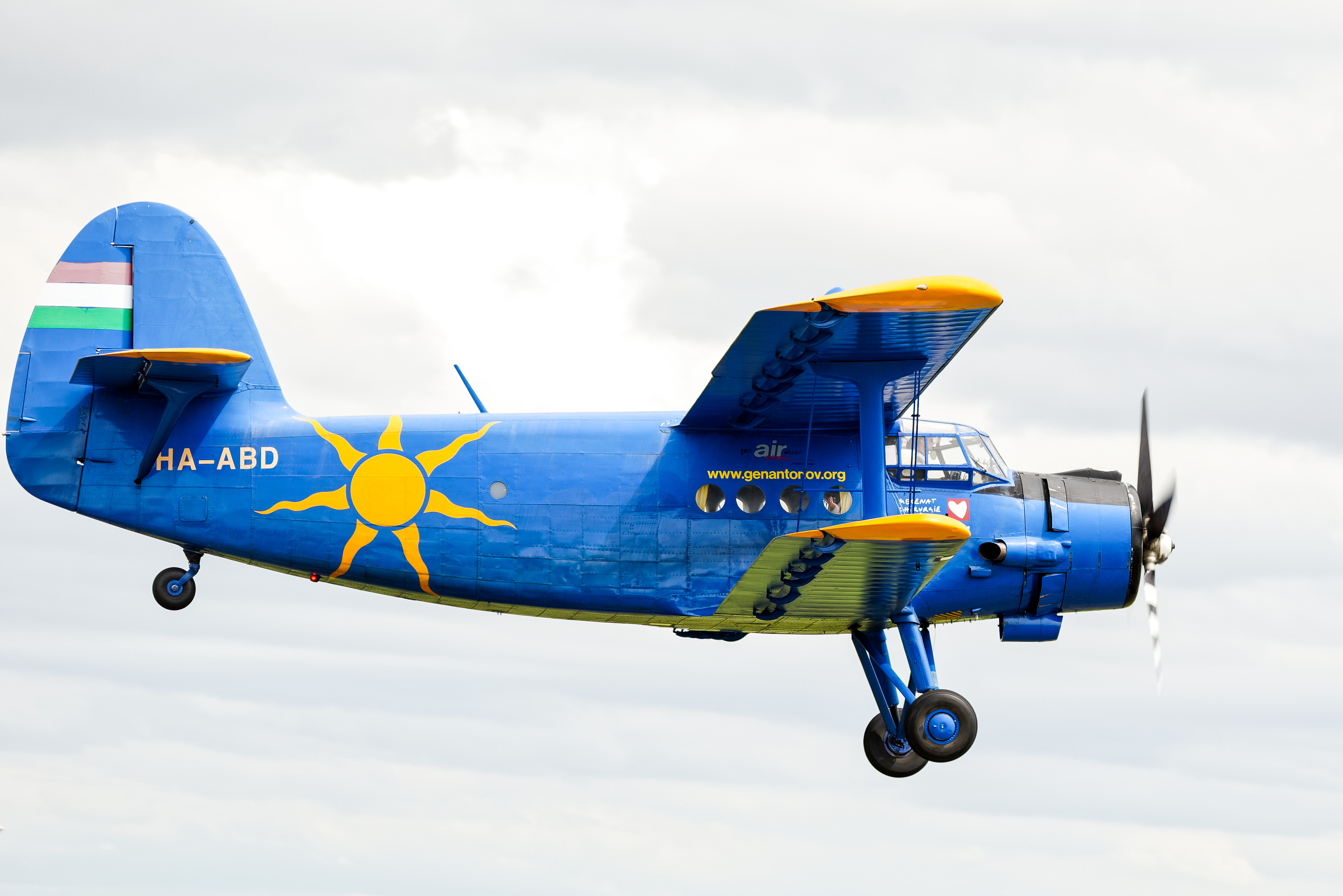 Antonov An-2 de l'association "GenAIRation Antonov", lors du meeting aérien de clôture du championnat de France 2016 de voltige aérienne. Aérodrome de Dijon-Darois (Côte d'Or, Bourgogne-Franche-Comté, France).